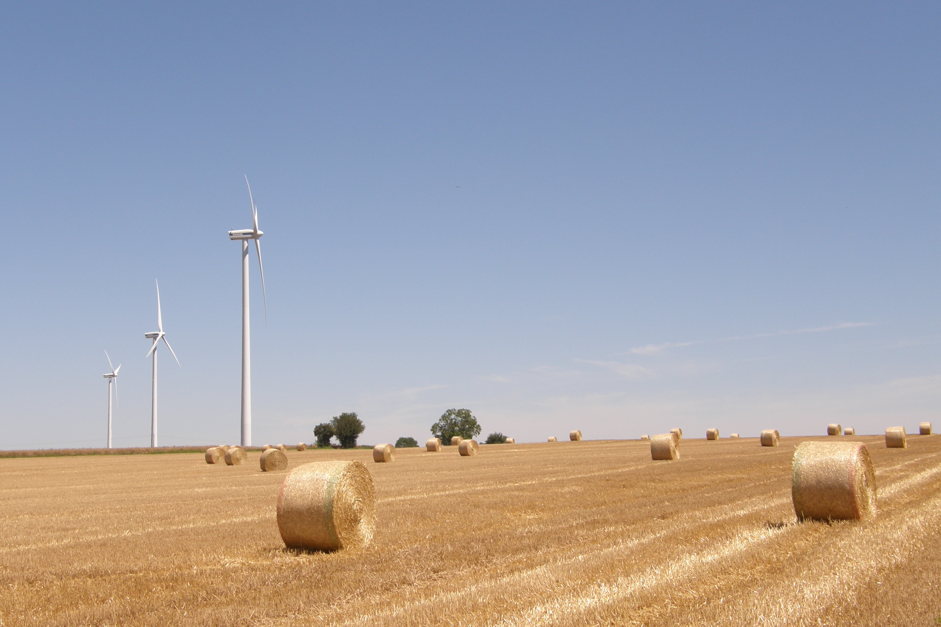 Trois des six éoliennes de Saint Martin lès Melle, département des Deux-Sèvres, France.